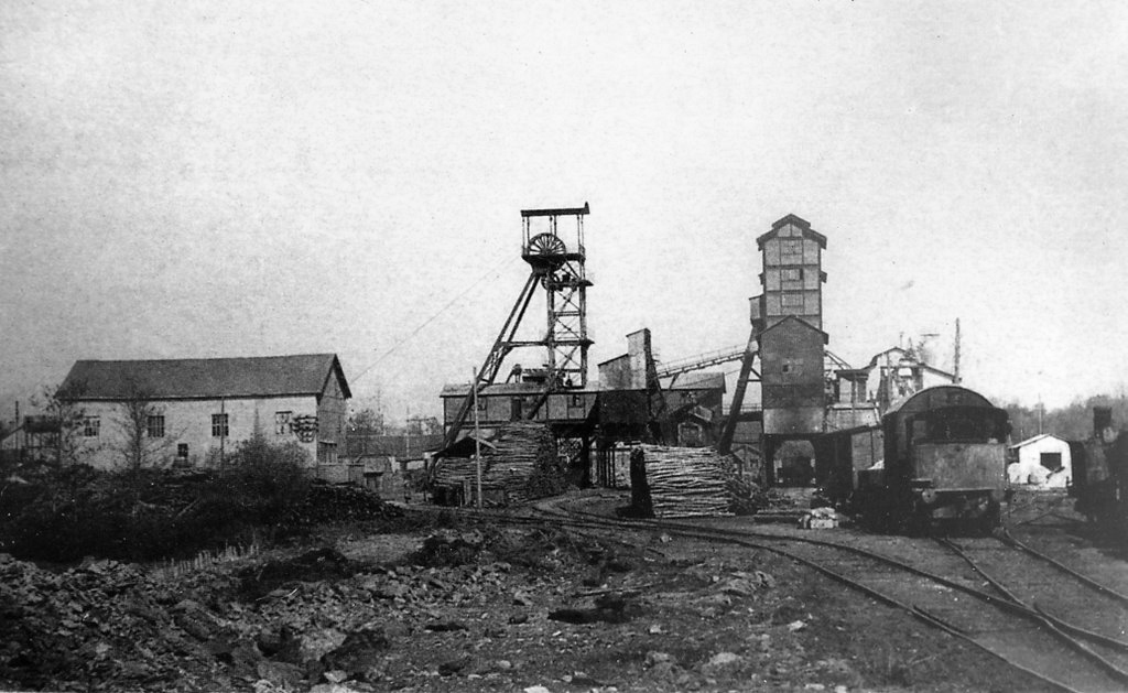 Le puits Bernard du bassin houiller de Faymoreau (Vendée, France).